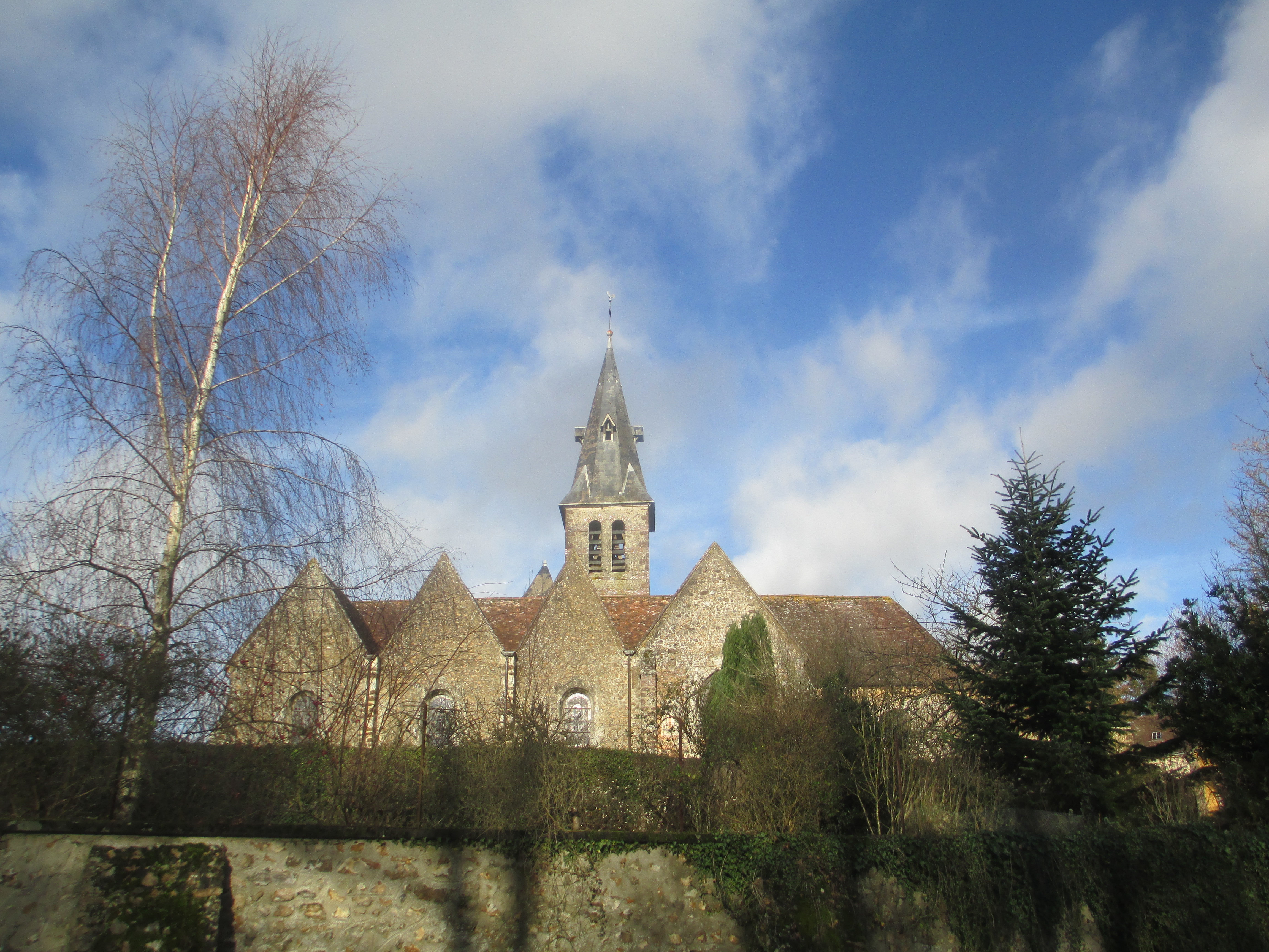 Église Sainte-Madeleine de la Madeleine-Bouvet vue depuis la rive de l'étang.